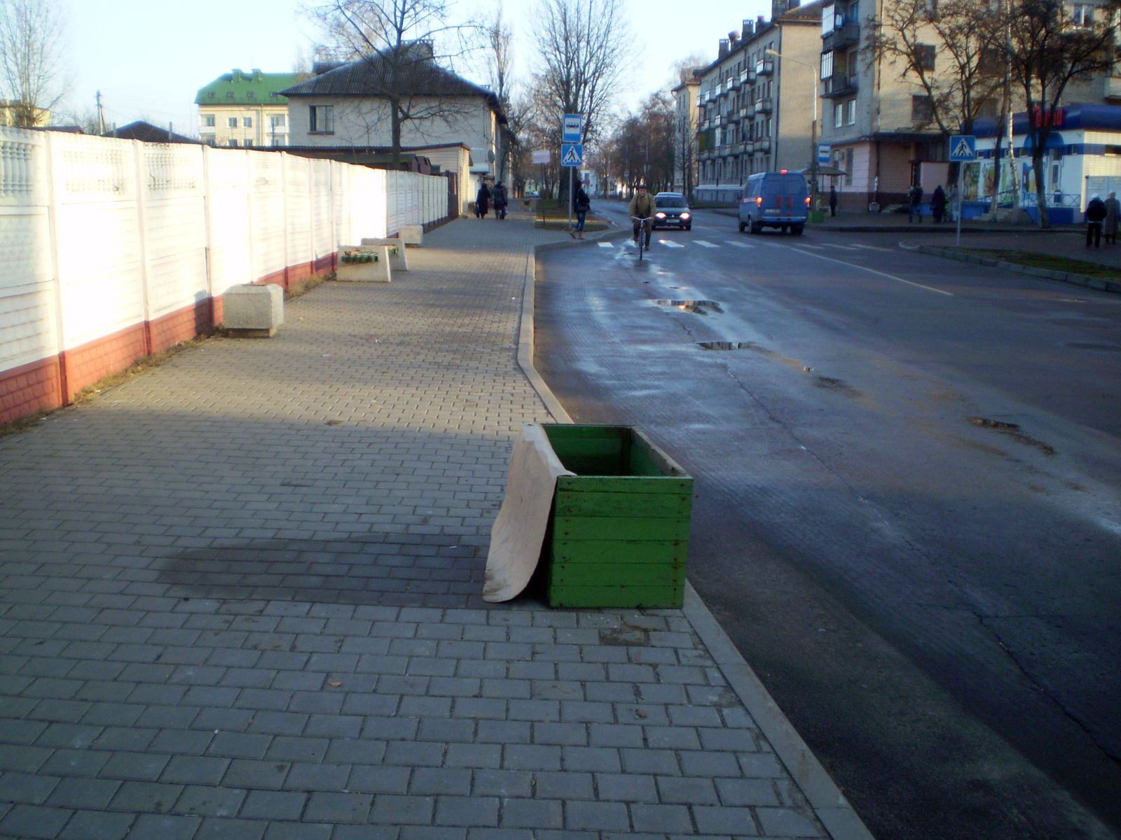 Прыпынак «Каледж гандлю»